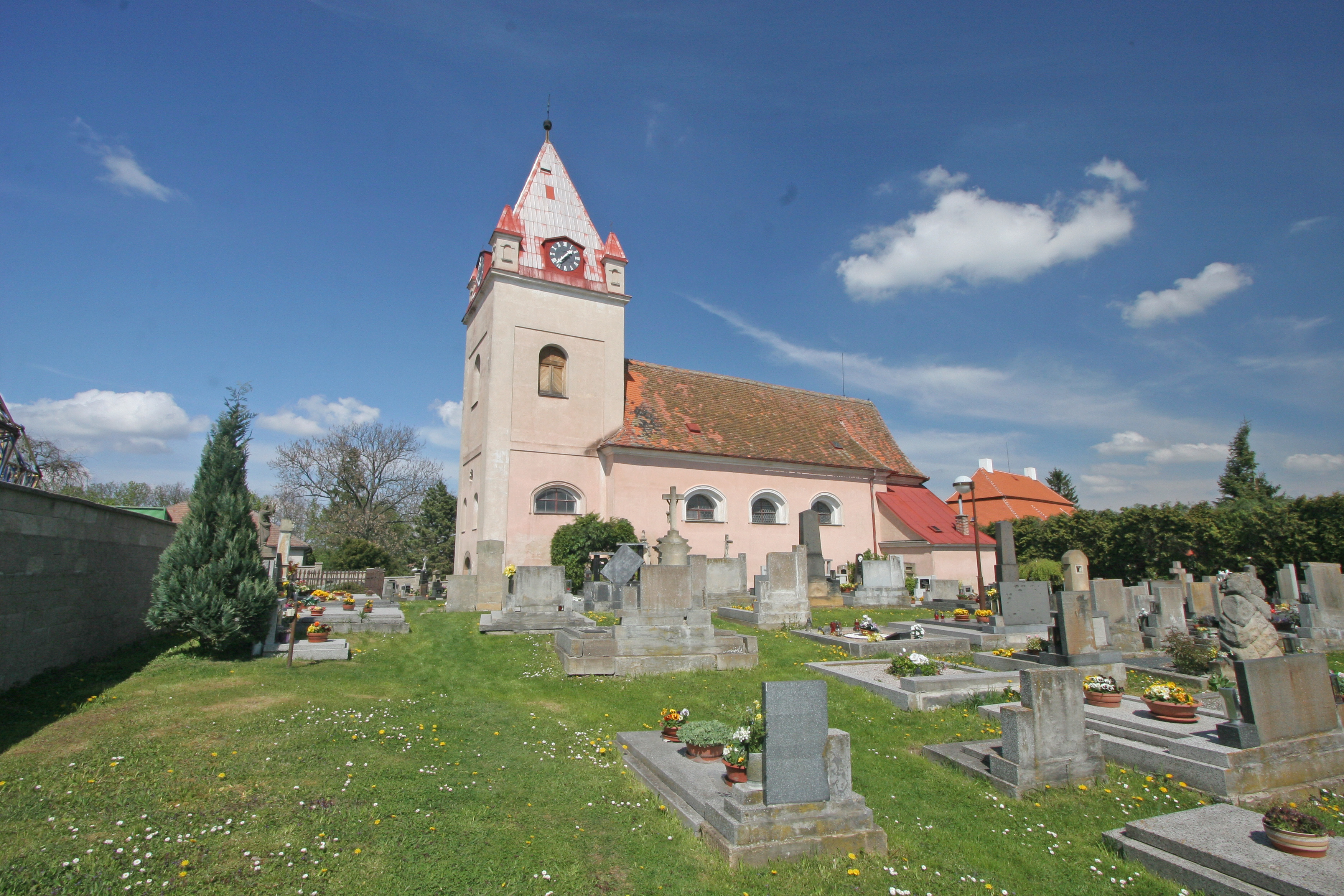 Kostel sv. Petra a Pavla (Žlunice), Žlunice